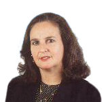 María Victoria Ovalle Ovalle, política chilena.